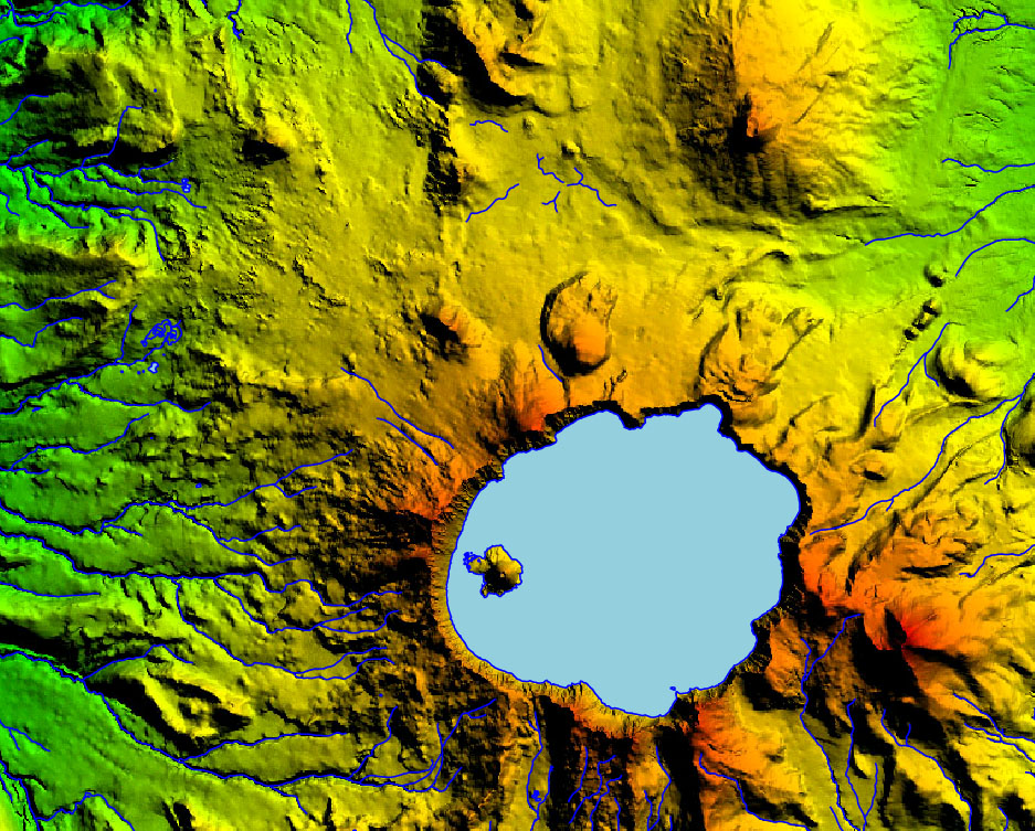 Crater Lake'i ümbruse kõrgusmudel koos vetevõrguga. Andmed kaardi koostamiseks sain siit.